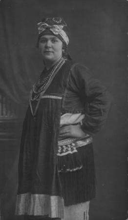 Бородулина Лида в стилизованном мордовском (эрзя) костюме. Пензенская губерния, г. Саранск.1917 г. Поколенное фото . Девушка стоит вполоборота, левая рука на поясе. На голове "французский" платок, повязанный на волосник, поверх платка лента с бантом. На панар надет фартук с рукавами (сапоня) и пулай, на груди несколько ниток бус и крест на ленте (гайтан)